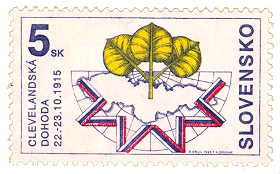 Марка посвящённая Кливлендскому соглашению